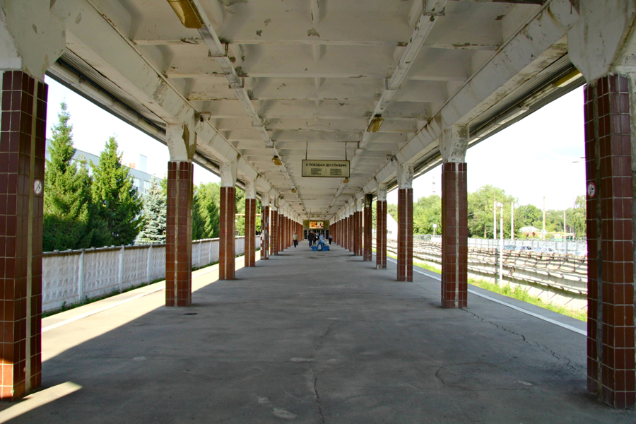 Samara Metro (Самарский метрополитен)